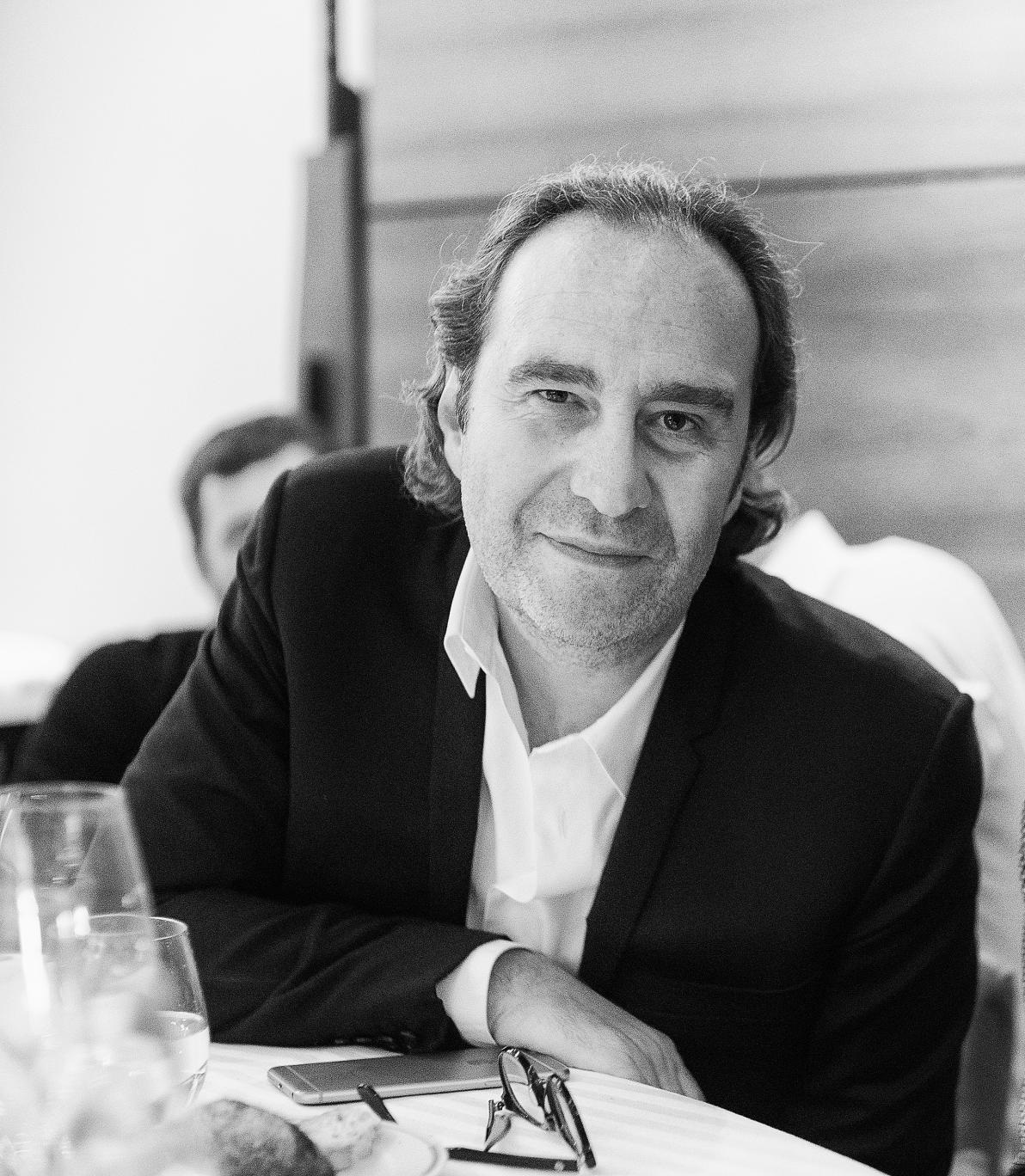 Xavier Niel, lors de la conférence LeWeb 2014.